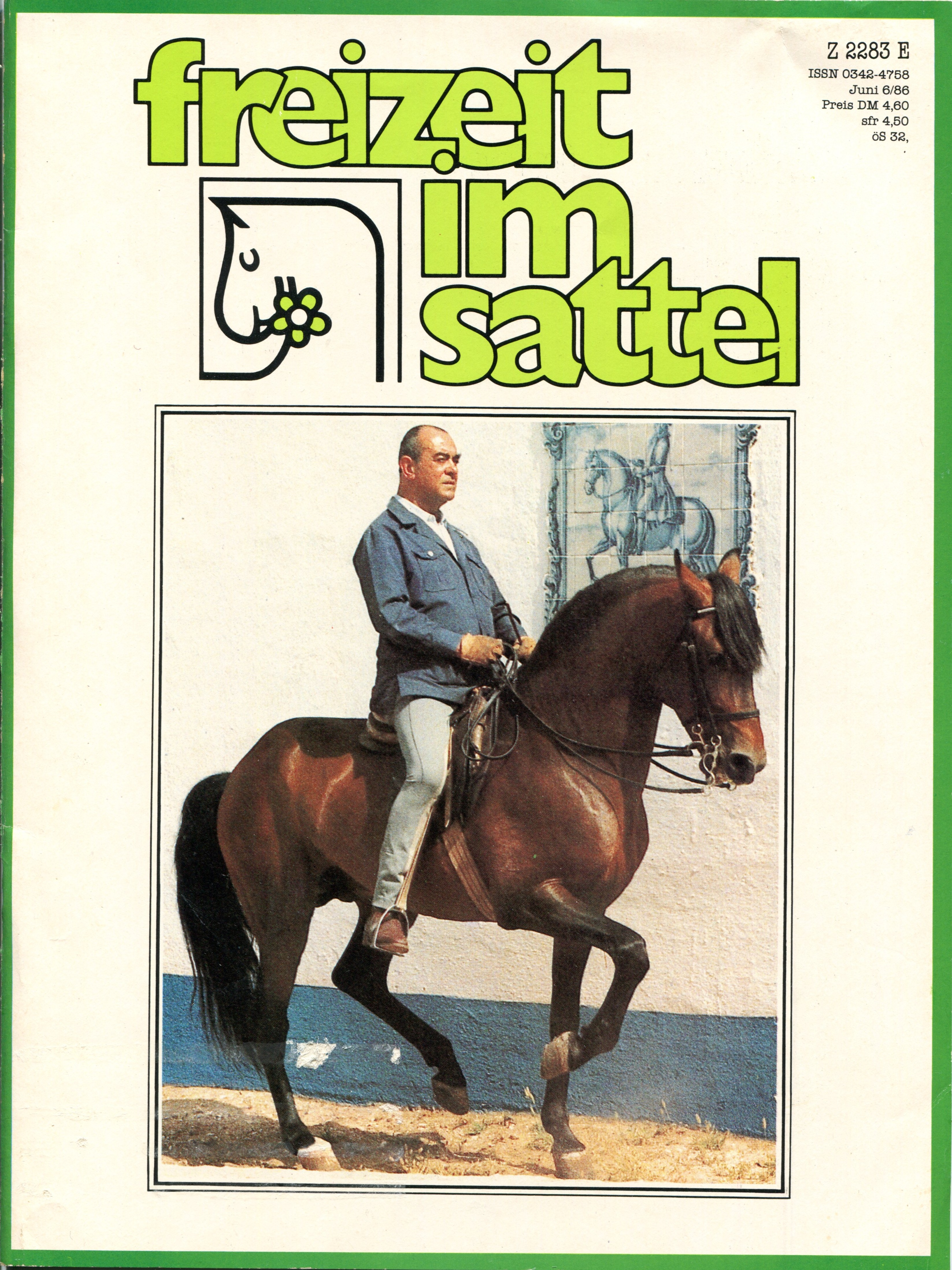 Freizeit im Sattel, 1/1983, Cover Freizeit im Sattel, Ausgabe Juni 1986